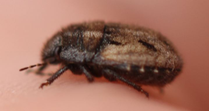 Wanze Odontoscelis lineola am 3. September 2018 auf einem sandigen Weg in der Schwetzinger Hardt